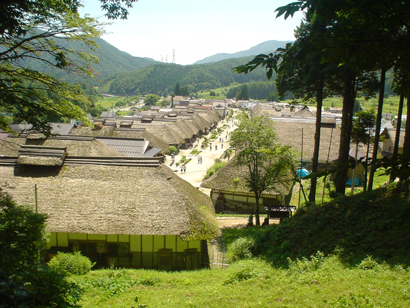 福島県ja:南会津郡ja:下郷町のja:大内宿の写真。 写真撮影：Fluffy_nns 撮影年月日：ja:2006年ja:7月26日 著作権：放棄します